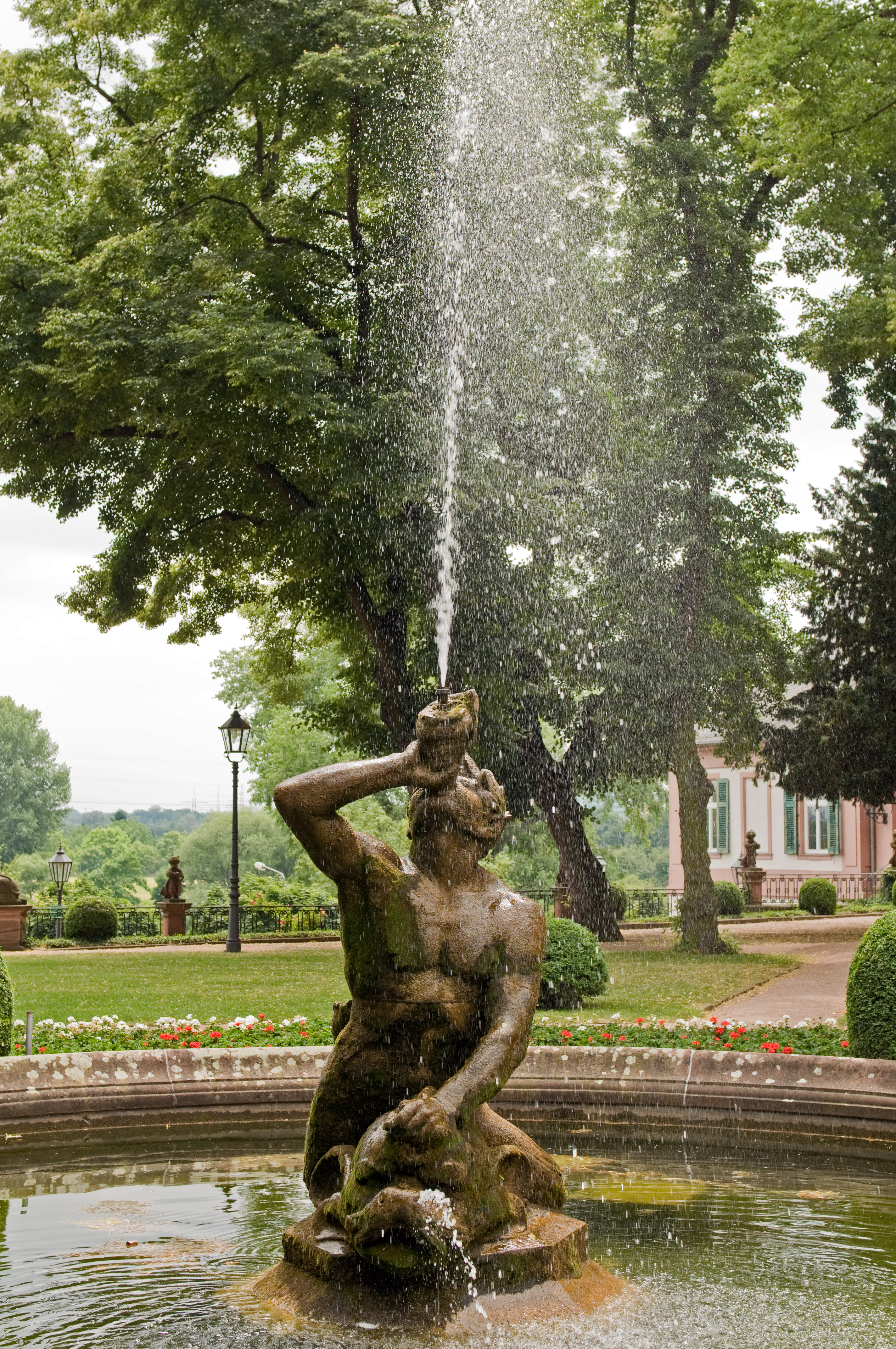 Triton im Bolongarogarten in Frankfurt-Höchst